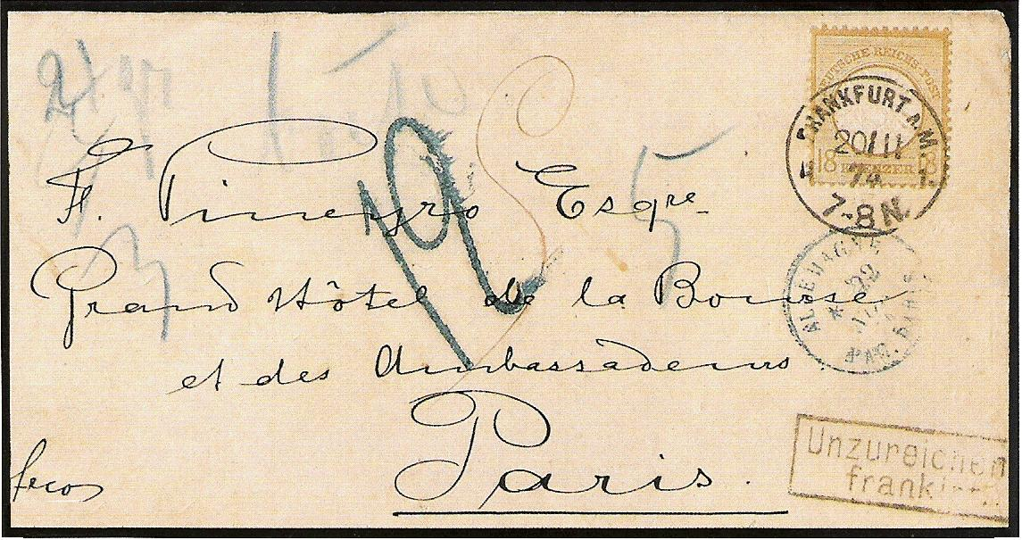 Briefumschlag Frankfurt am Main - Paris, 1874. Frankiert mit Dauermarke "Brustschildausgabe", 18 Kreuzer. Mit Nachgebühr Nachgebührstempel